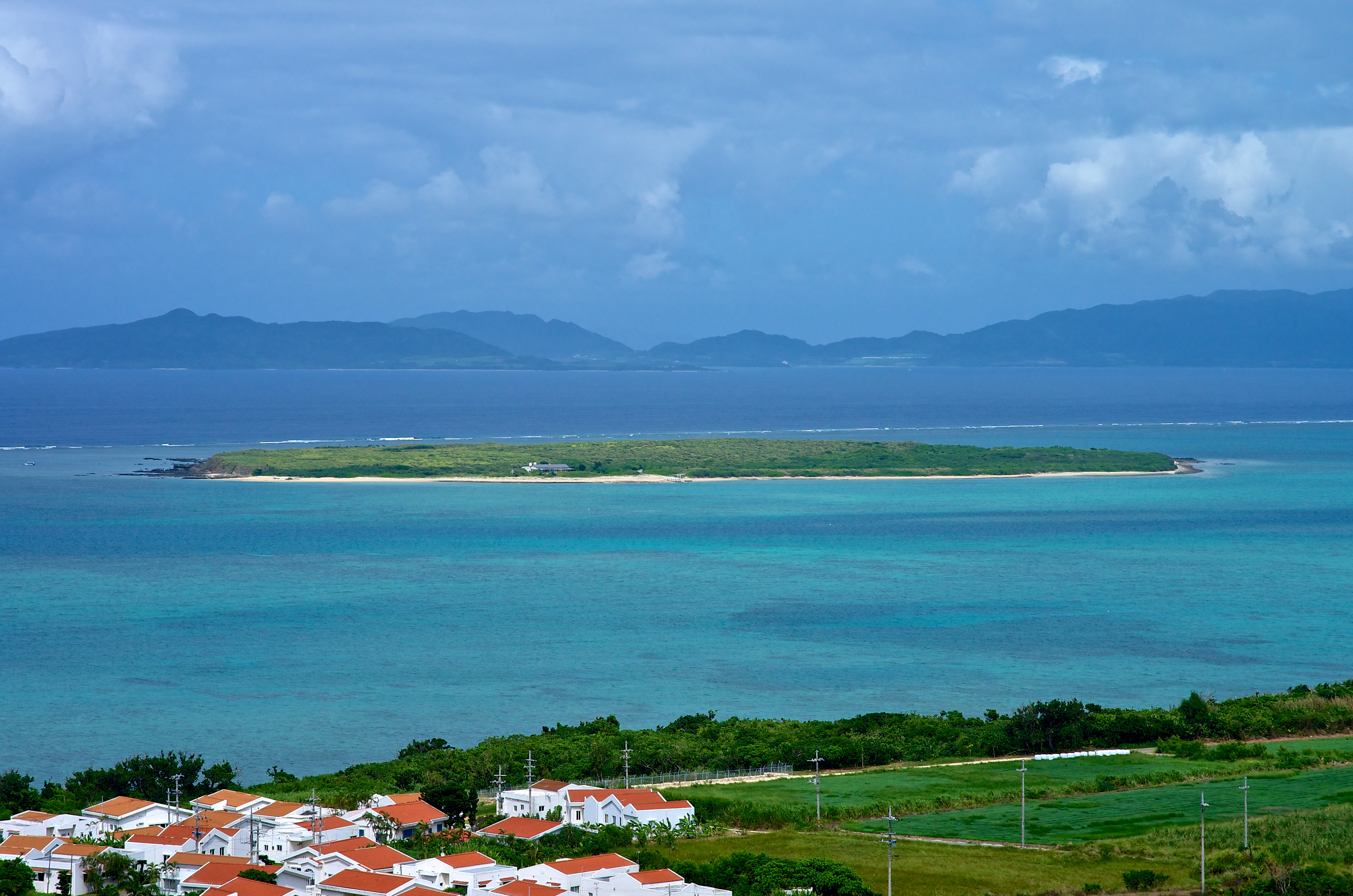 小浜島大岳から見た嘉弥真島。遠くに石垣島を望む。